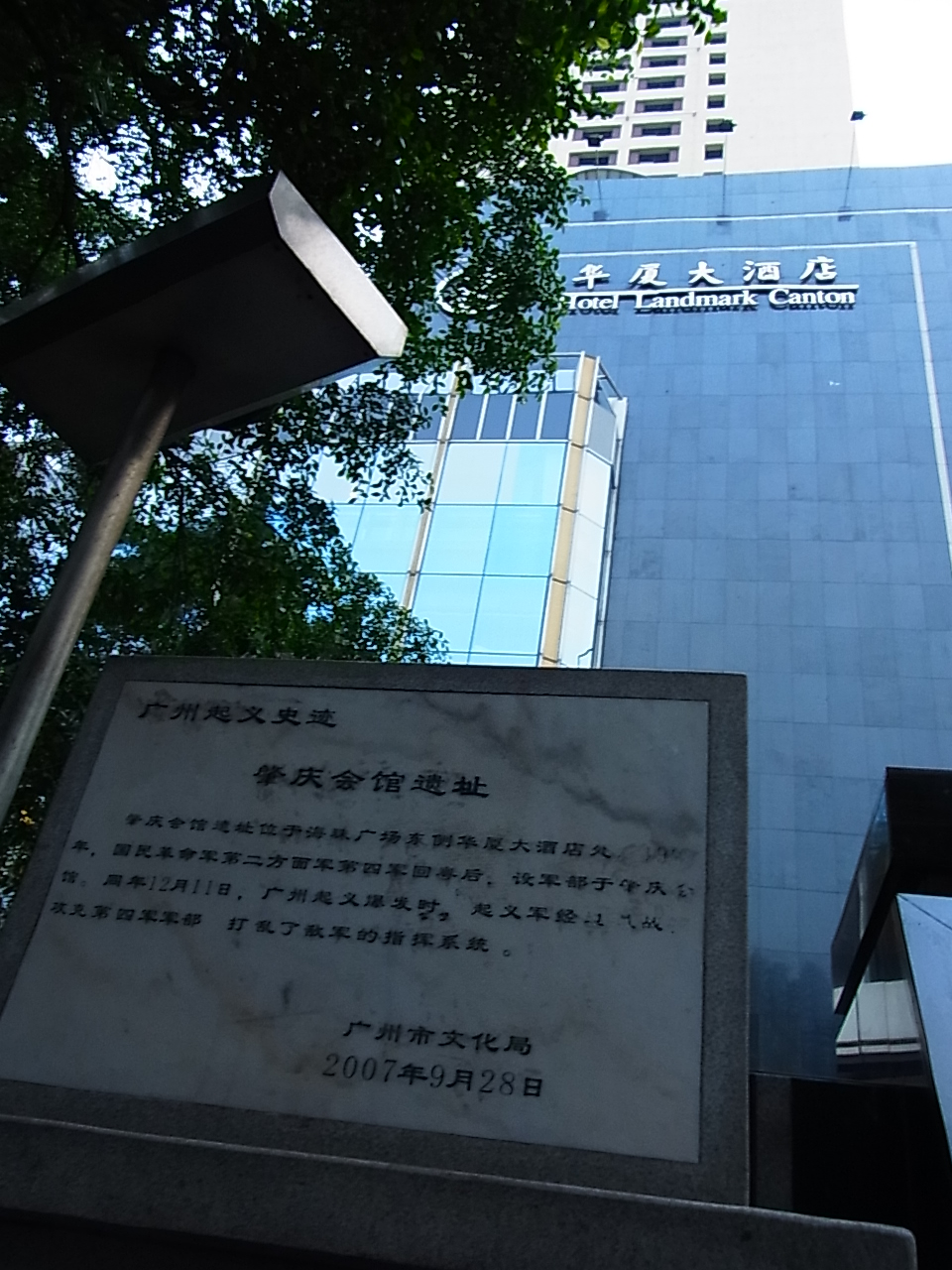 中文（香港）: 廣州暴動肇慶會館遺址